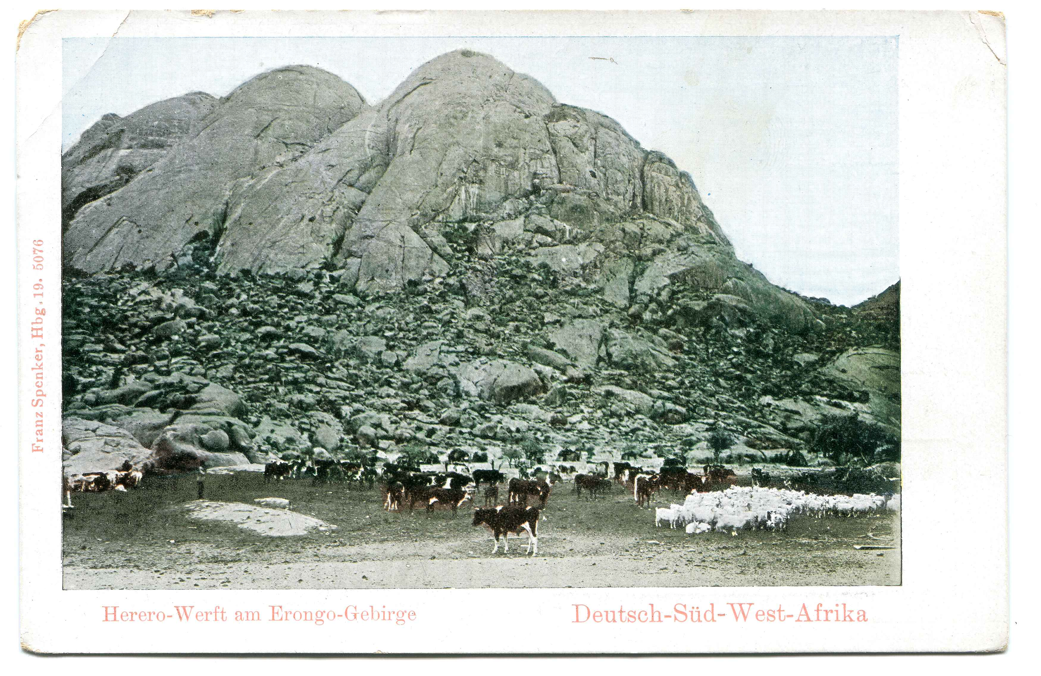 Historische Postkarte, Foto von Franz Spenker. Fotografie einer traditionellen Herero-Siedlung (Werft) im Erongogebirge, Namibia (damals Deutsch-Südwestafrika).